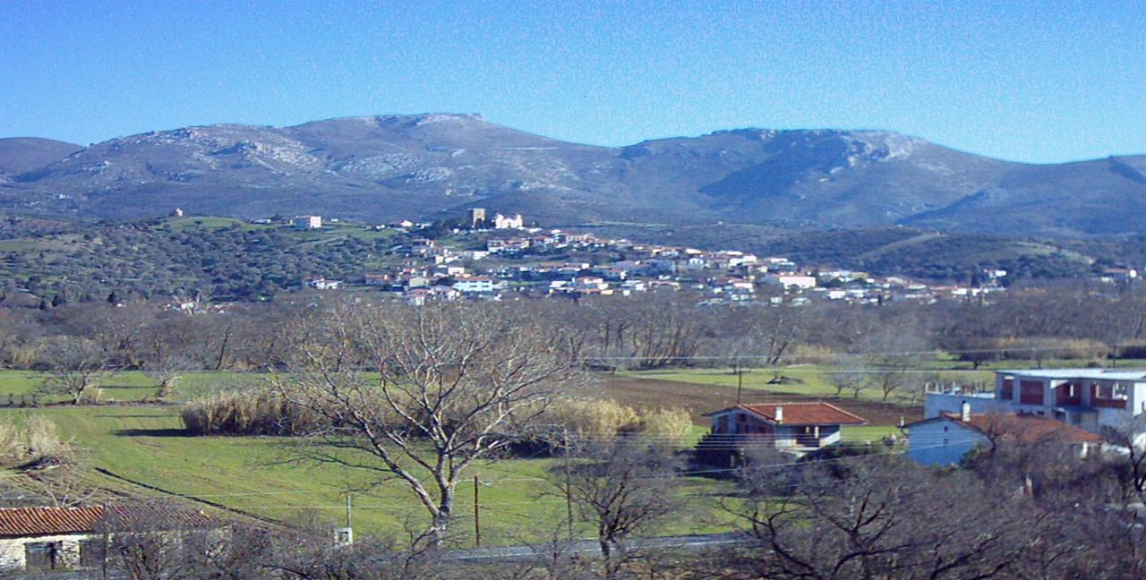 Αυλωνάρι Εύβοιας